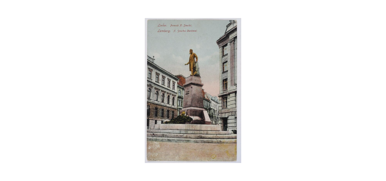 Франц Смолька, Львів